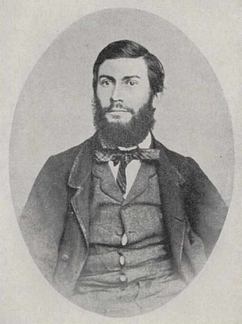 Hugo Ullik (1838-1881), český malíř divadelních dekorací, ilustrátor a krajinář